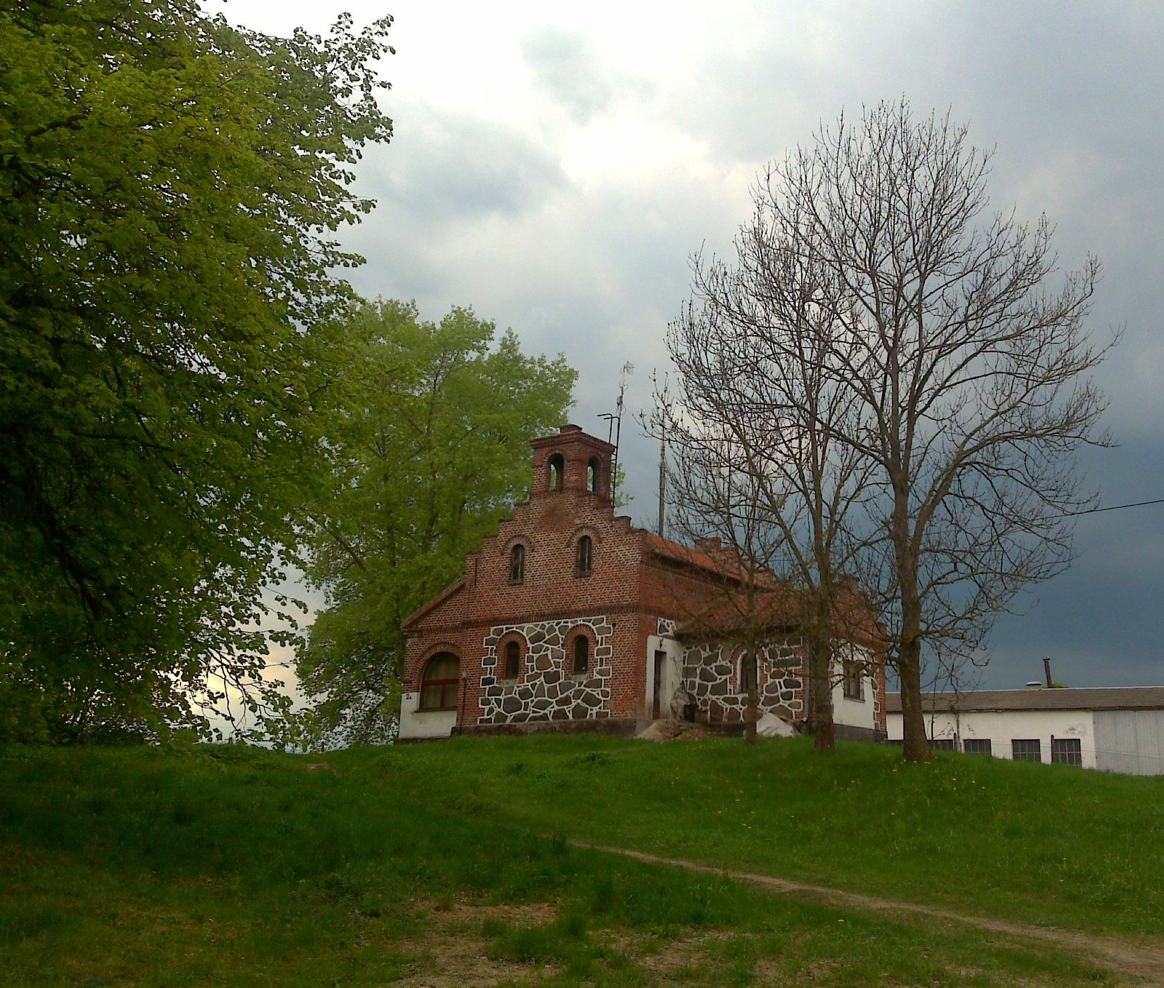 Doba - kuźnia